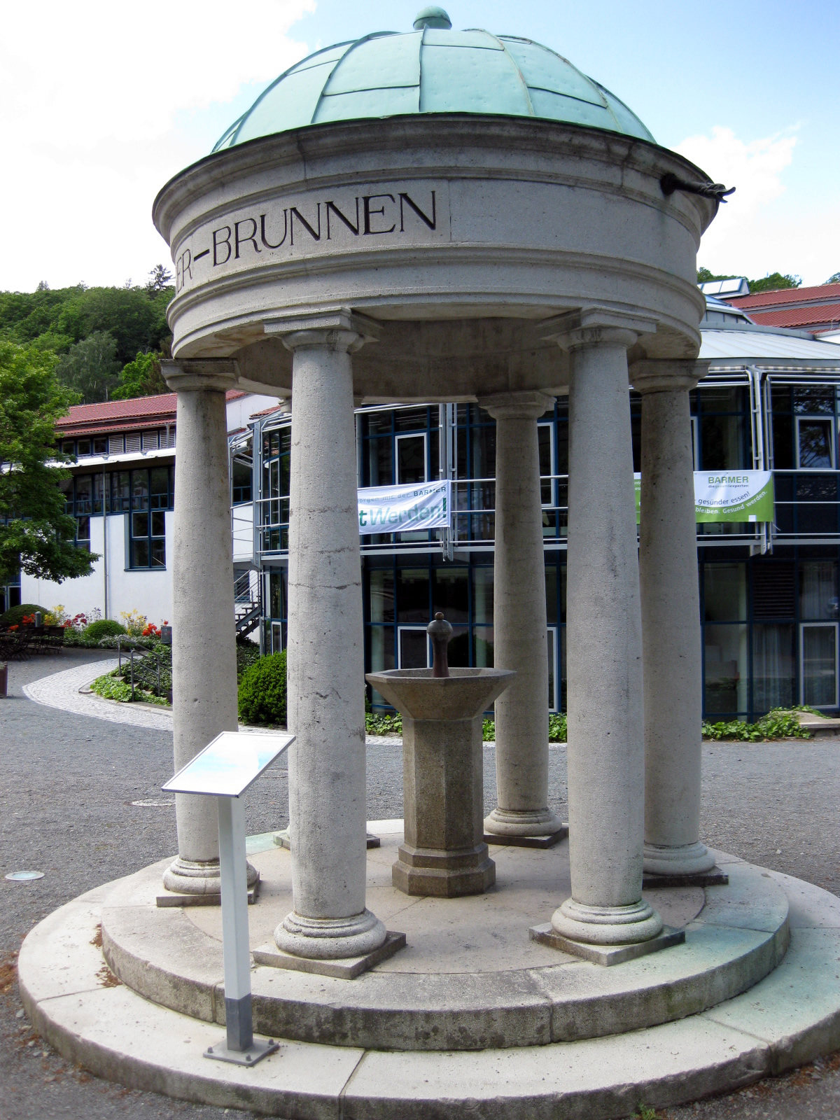 Calciumsole-Quelle